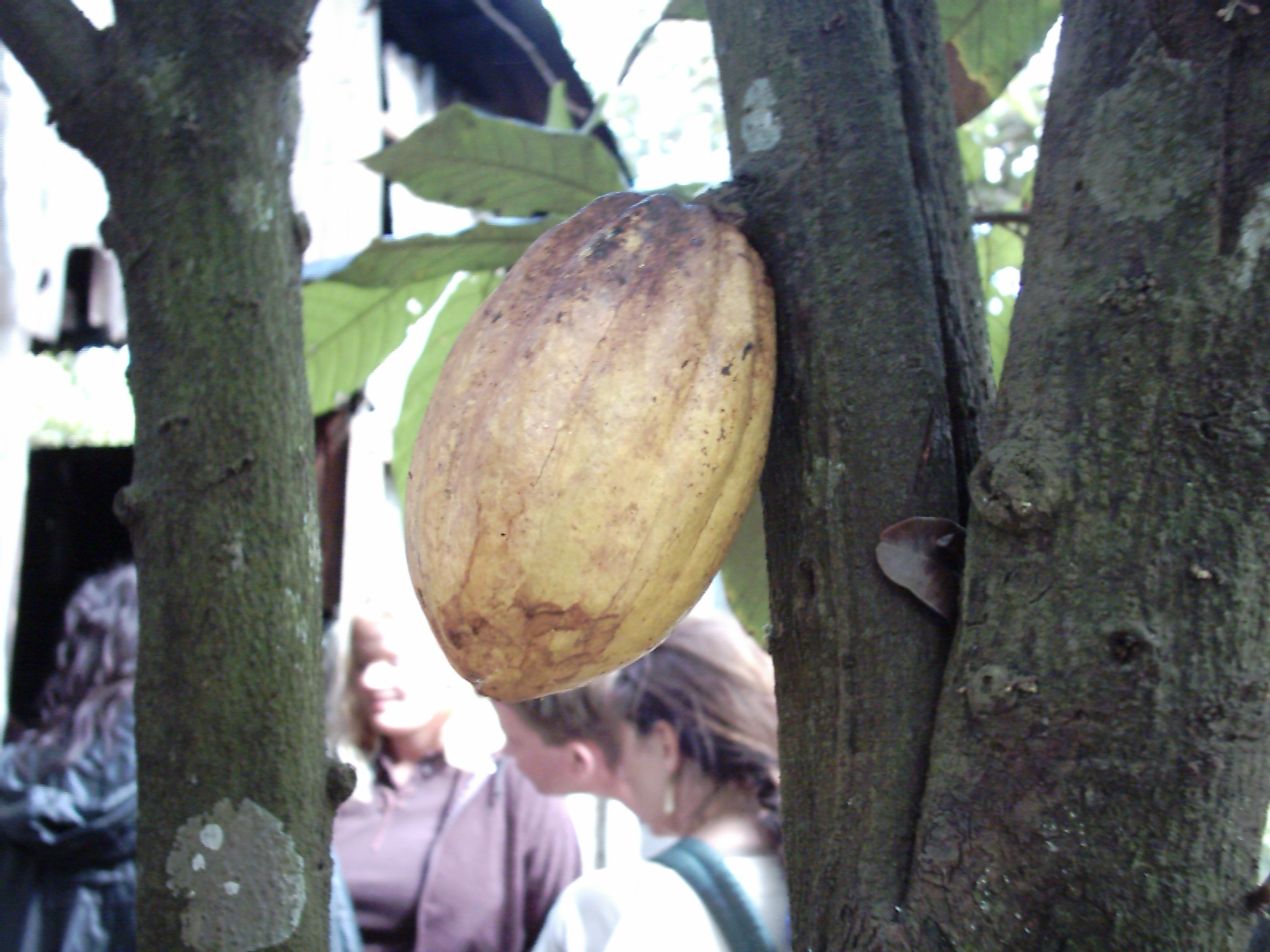 Die Kakaopflanze ist kauliflor, d.h. ihre Blüten und Früchte entstehen direkt am Stamm oder an dicken Ästen